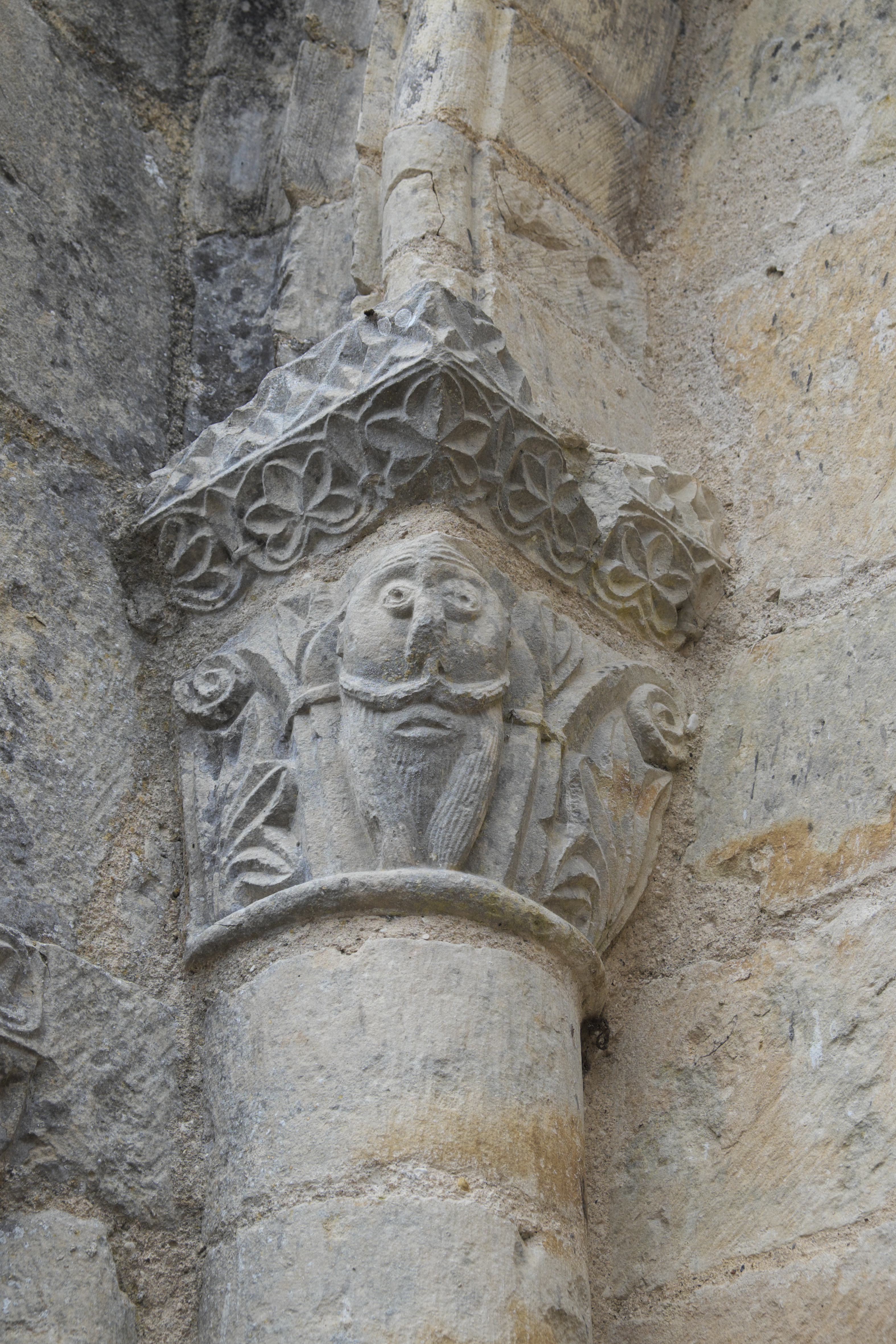 Katholische Kirche Saint-Jean-Baptiste in Jazeneuil im Département Vienne (Nouvelle-Aquitaine/Frankreich), Kapitell an der Westfassade